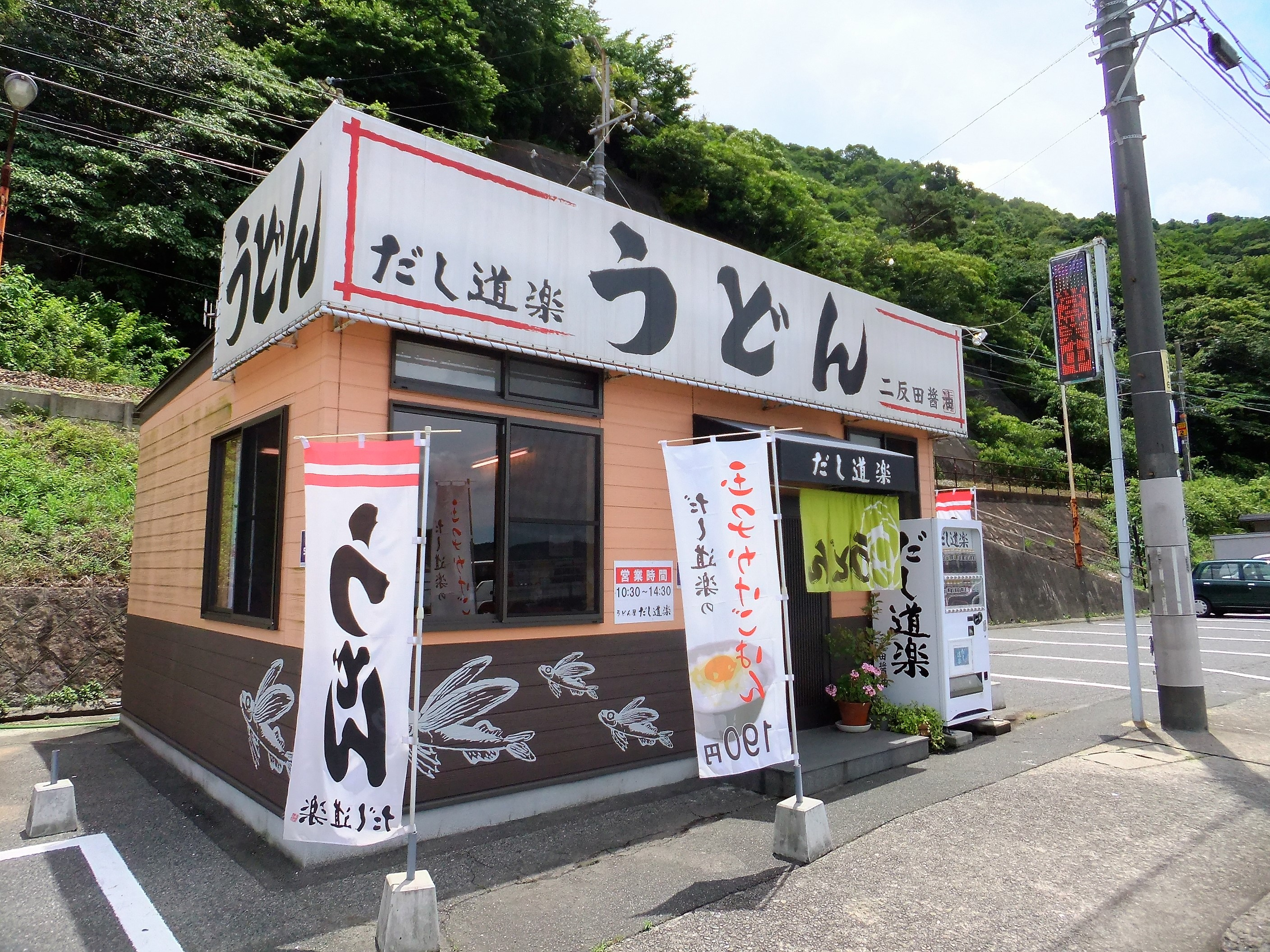 二反田醤油直営のうどん店